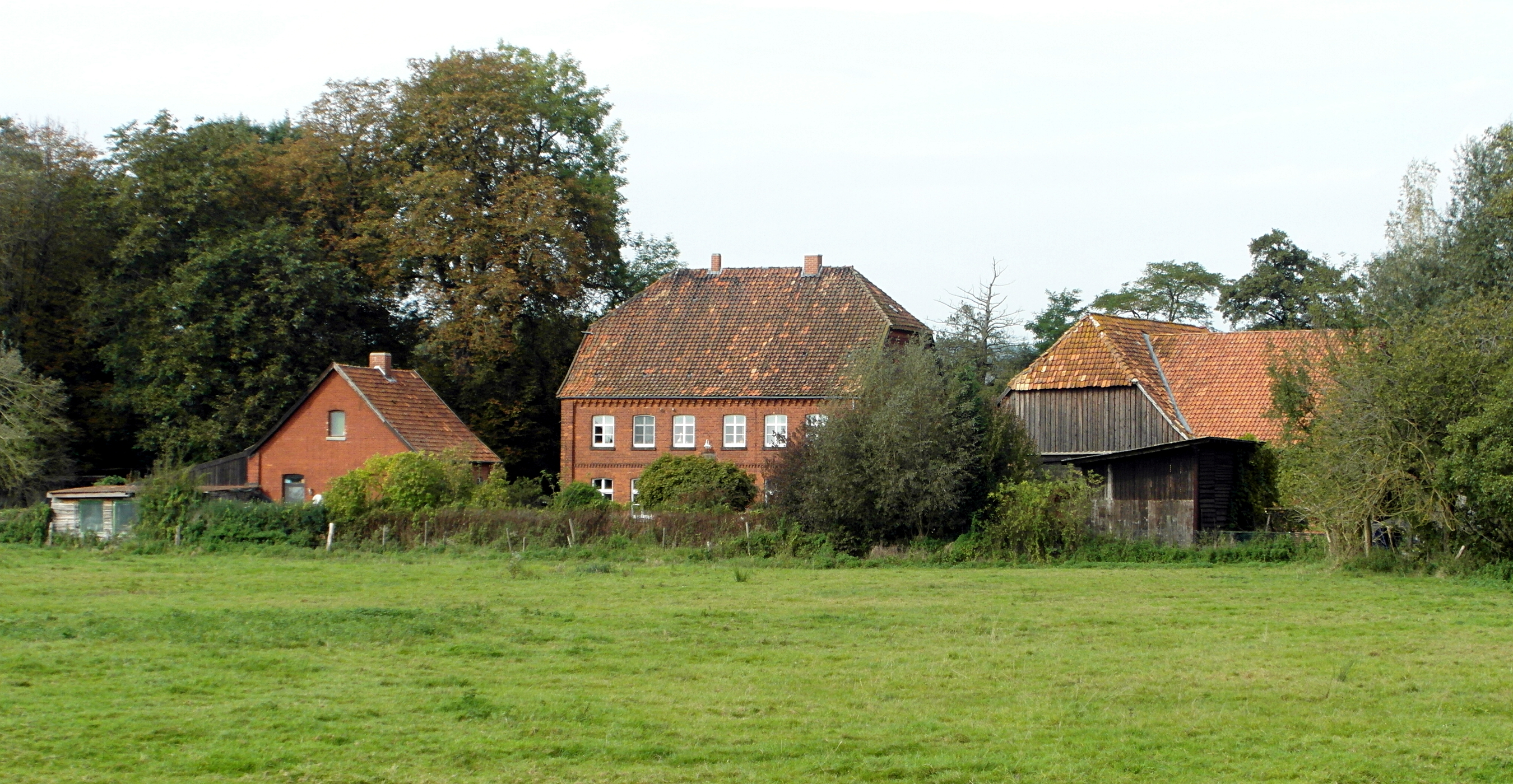 Die Hallermühle beim Springer Stadtteil Mittelrode gehörte früher zum Gut derer von Jeinsen (Gut I) in Gestorf. Das Baujahr ist unbekannt, erwähnt wird die Mühle das erste Mal 1766. Das heutige Wohnhaus wurde 1860 erbaut.